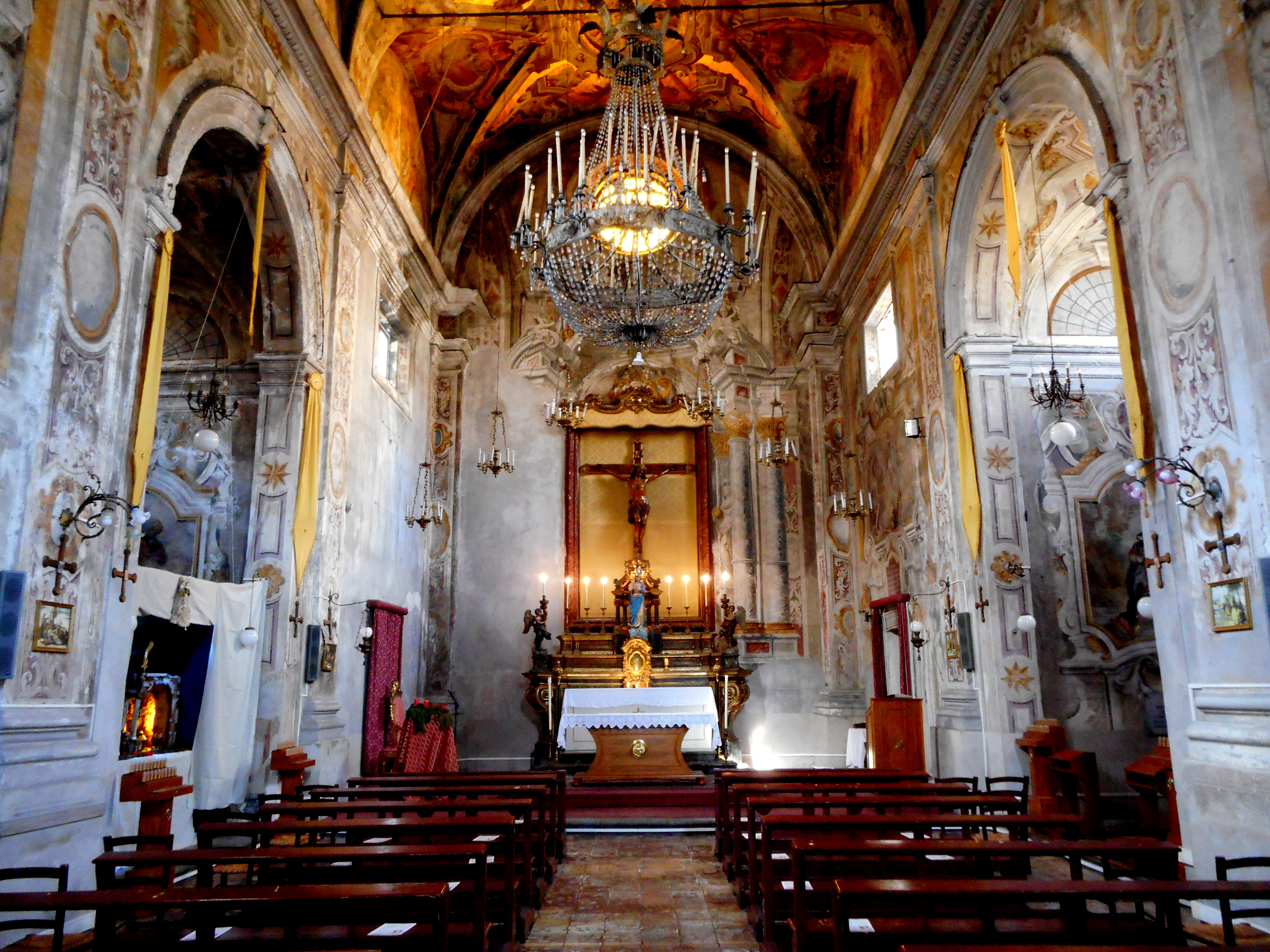 Interno della chiesa dei Santi Quaranta Martiri Pisani